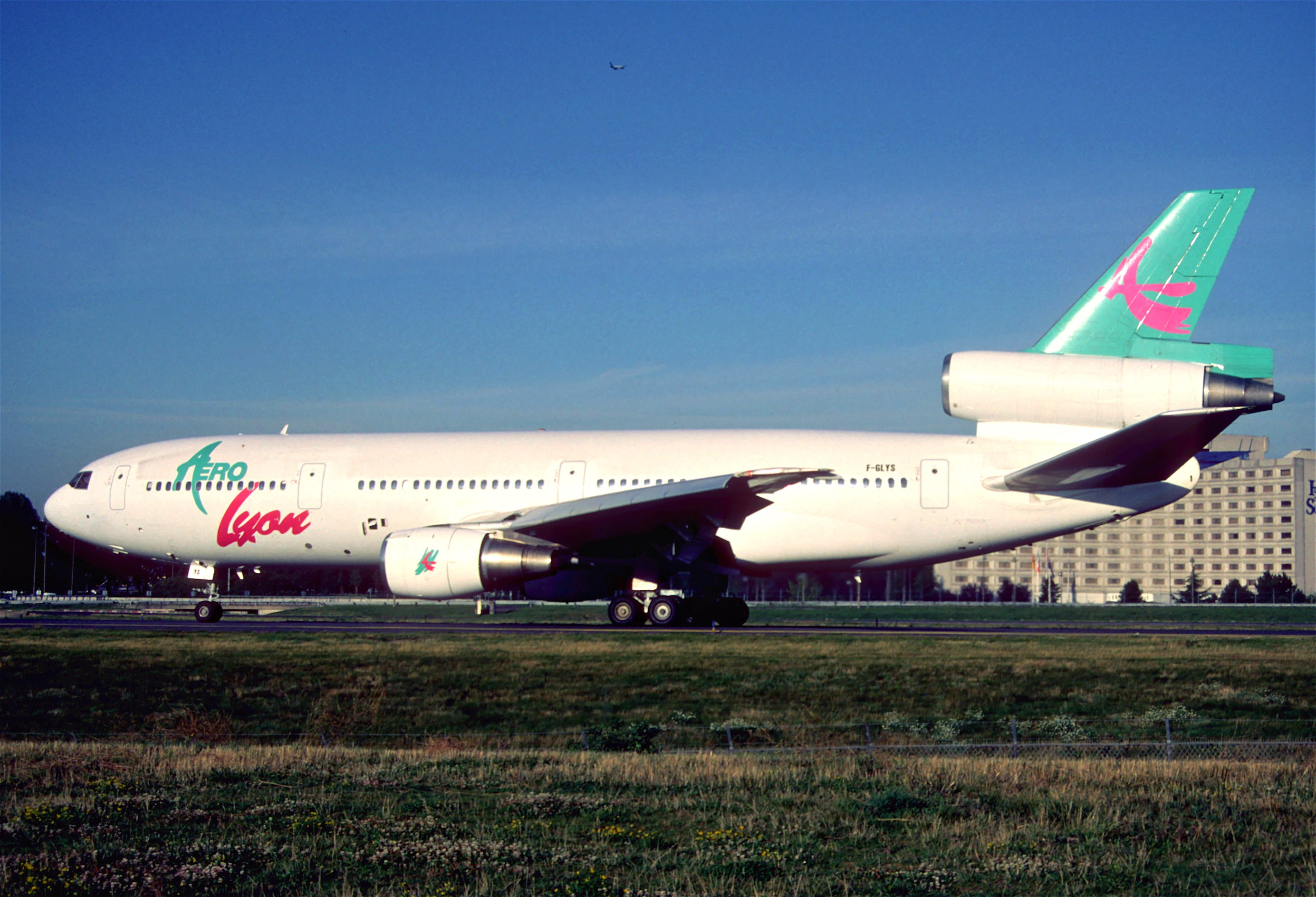 145bg - Aero Lyon DC-10-30; F-GLYS@CDG;11.08.2001